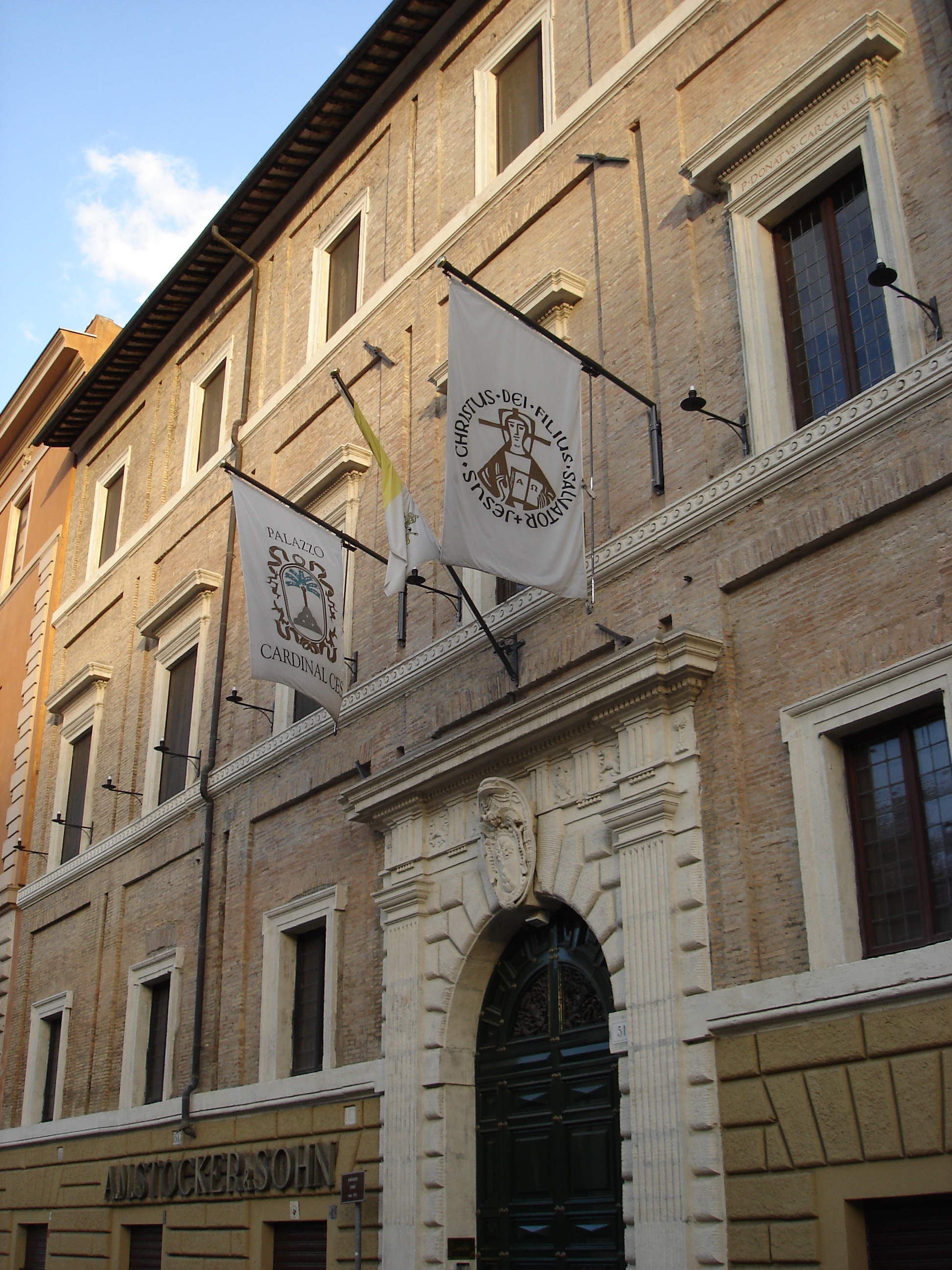 Palazzo Cesi Armellini in Rome in July